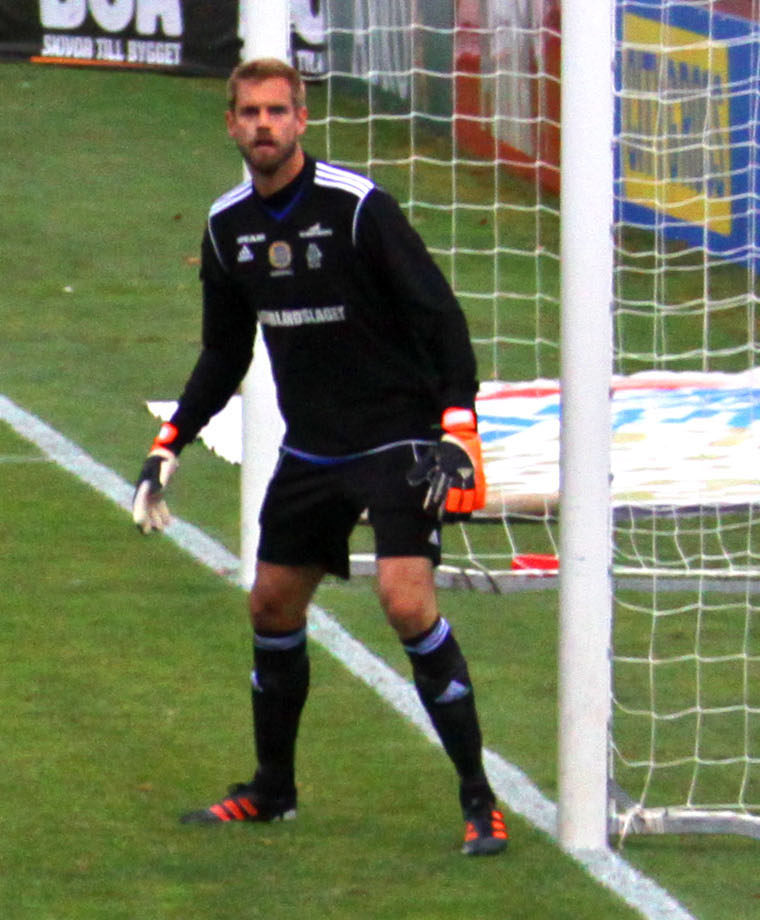 Oscar Berglund